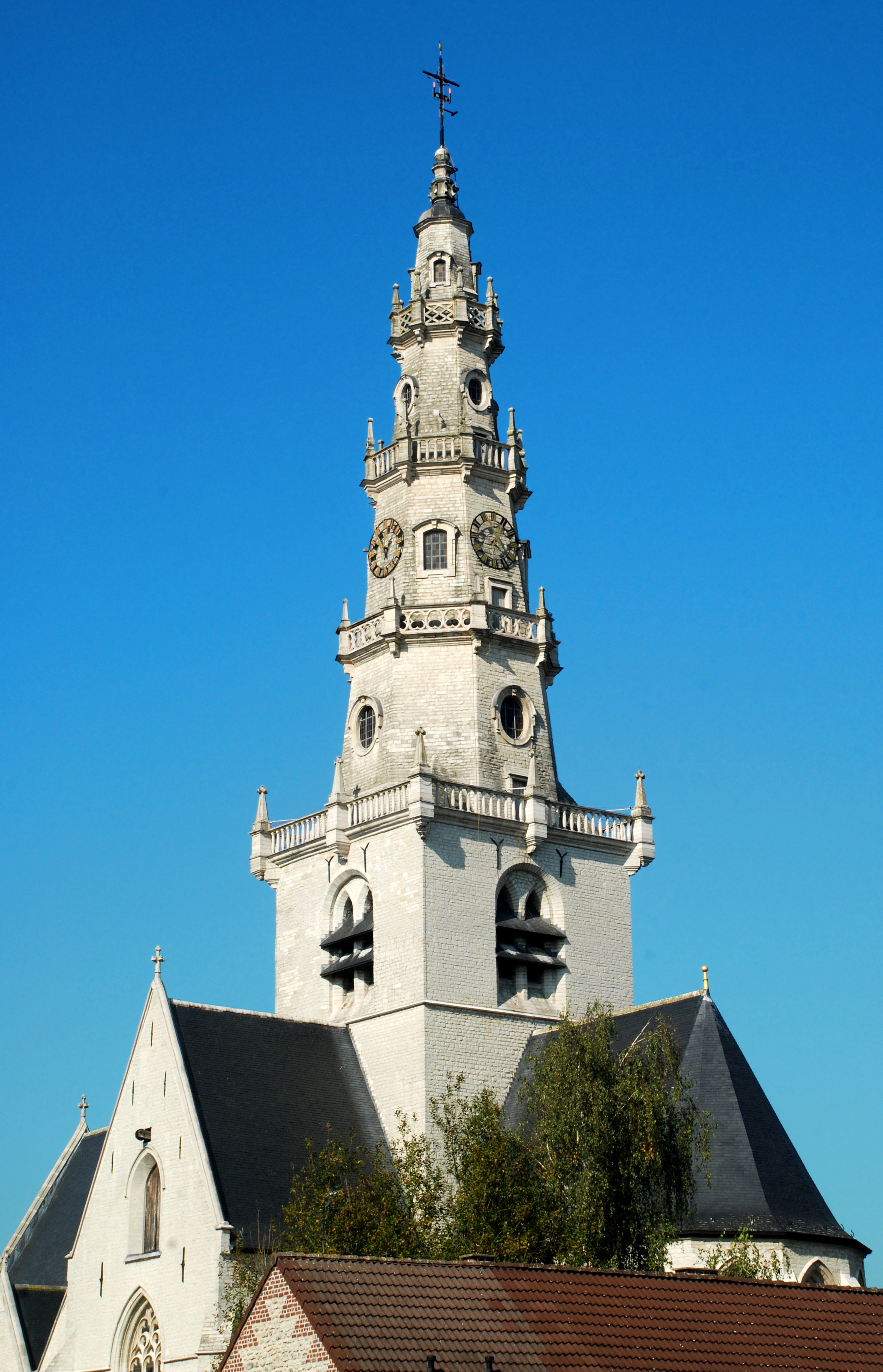 Belgique - Brabant flamand - Diegem - Église Sainte-Catherine et Saint-Cornélius